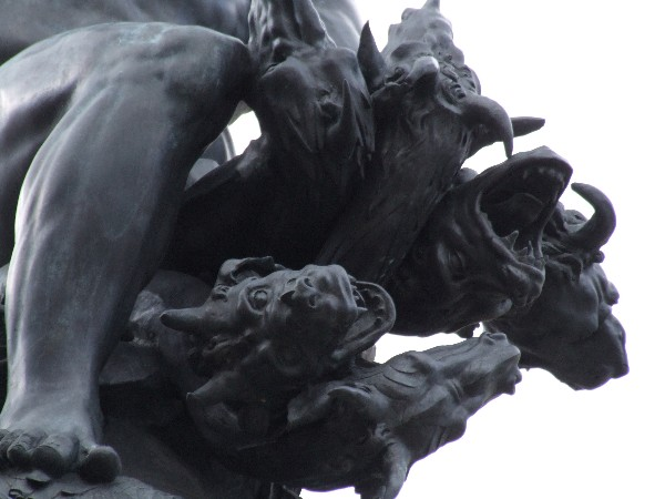 Augsburg Herkulusbrunnen in der Maximilianstraße